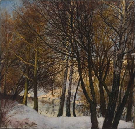 Žiemos peizažas. Kartonas, aliejus. 47 x 44 cm. Lietuvos dailės muziejus